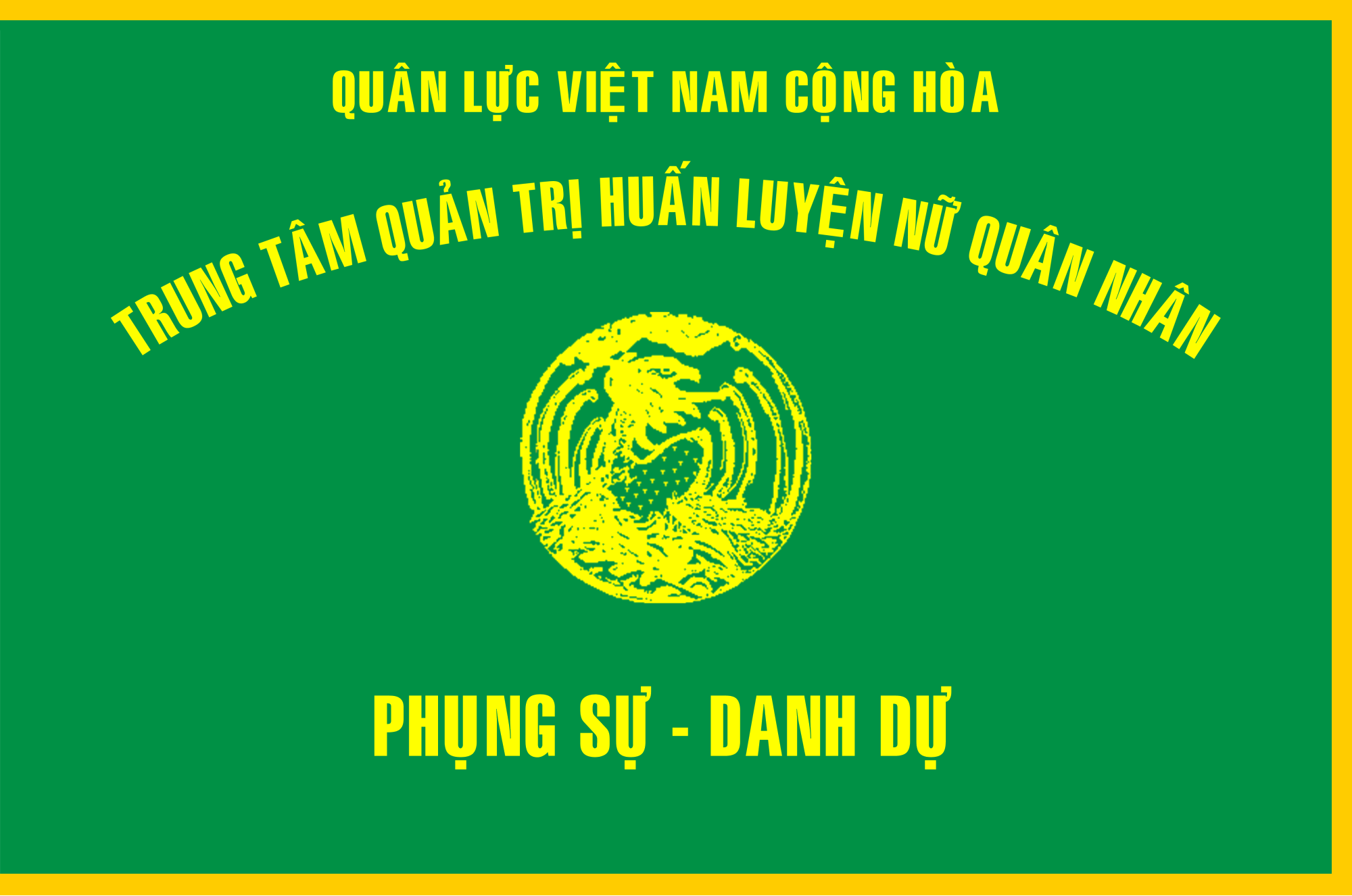 The flag of South Vietnamese Women's Army Corps Training Center (Trung tâm Quản trị Huấn luyện Nữ quân nhân), used since 1965 to 1975.